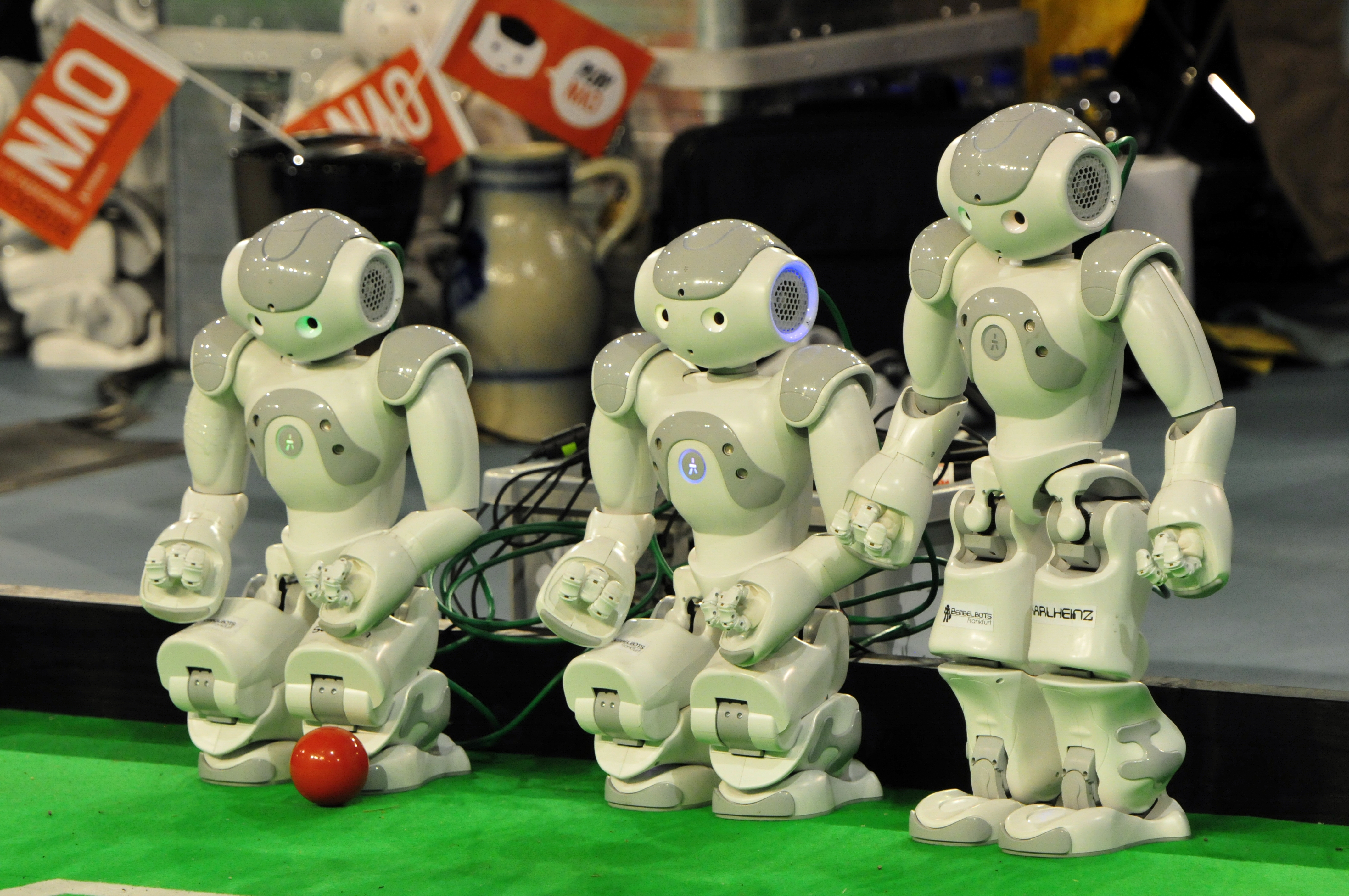 Eindhoven, Niederlande, Robocup 2013